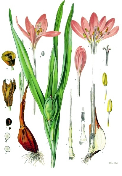 Herbstzeitlose. A B blühende, C fruchtende Pflanze in natürl. Grösse; 1 Knolle im Längsschnitt, desgl.; 2 der zur neuen Knolle anschwellende Theil, oben mit Fruchtknoten, desgl.; 3 u. 4 Blüthenknospe, desgl.; 5 ausgebreitete Blüthe, desgl.; 6 oberer Theil des Griffels, vergrössert; 7 Staubgefässe desgl.; 8 Pollen, desgl.; 9 reife, aufgesprungene Kapsel, natürl. Grösse; 10 Kapsel im Querschnitt, desgl.; 11 Same, natürl. Grösse und vergrössert; 12, 13 derselbe ohne Schale, vergrössert.